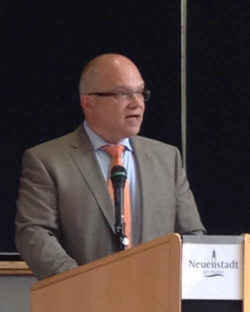 Norbert Heuser, Bürgermeister von Neuenstadt am Kocher, am 31. Juli 2015 in der Stadthalle Neuenstadt am Kocher, Informationsveranstaltung zur in der ehemaligen Autobahnmeisterei eingerichteten Zeltstadt als Ausweich-Notunterkunft für Asylbewerber der Landes-Erstaufnahme-Einrichtung Ellwangen.